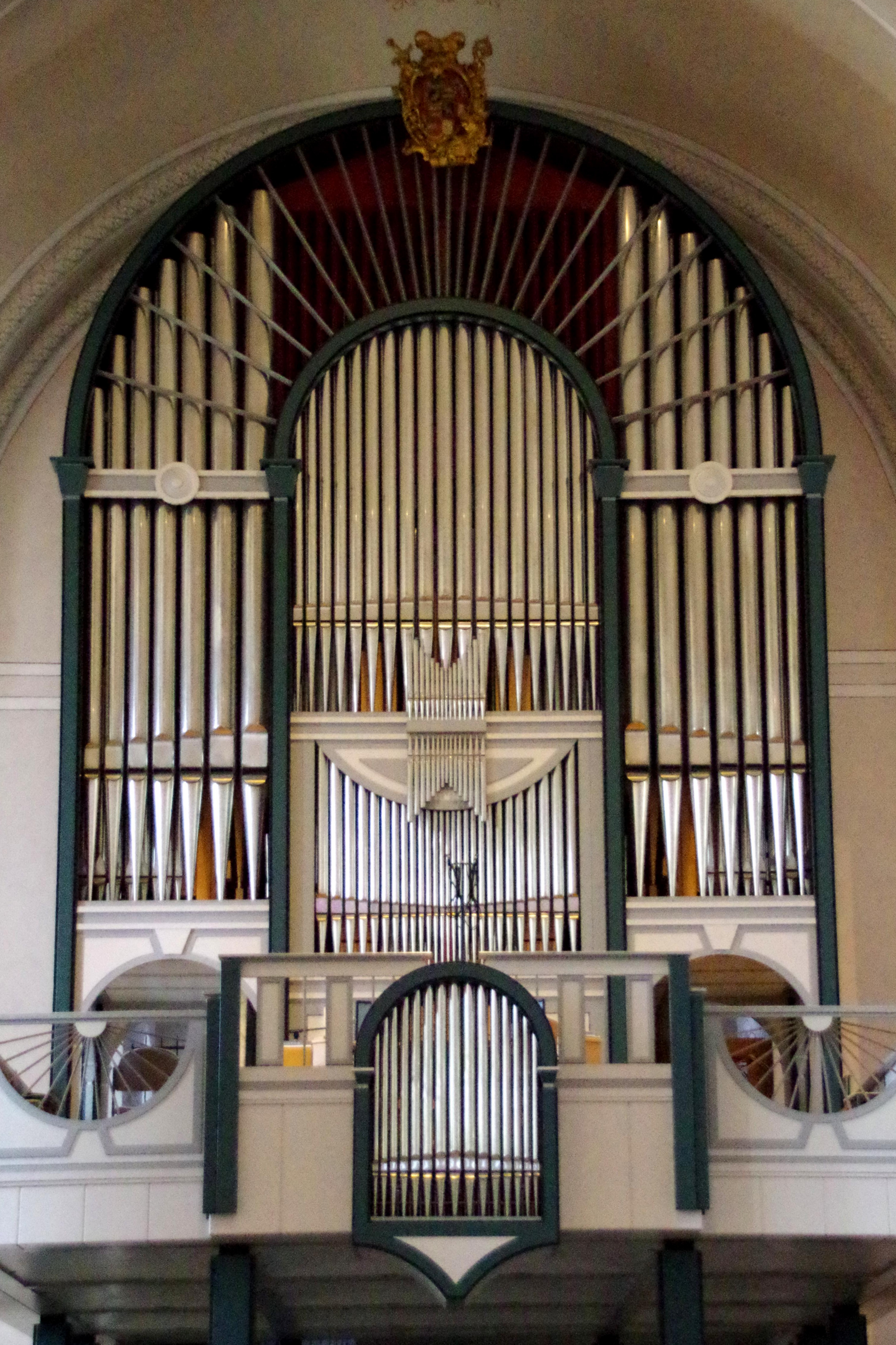 St. Marcellinus und Petrus (Vallendar), Orgel mit 52 Registern und 3499 Pfeifen